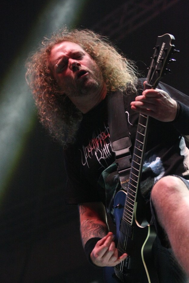 Anton Reisenegger in live.